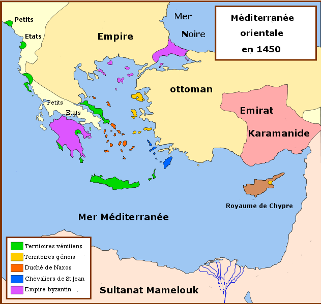 Carte de la Méditerranée orientale vers 1450 juste avant la chute de Constantinople.